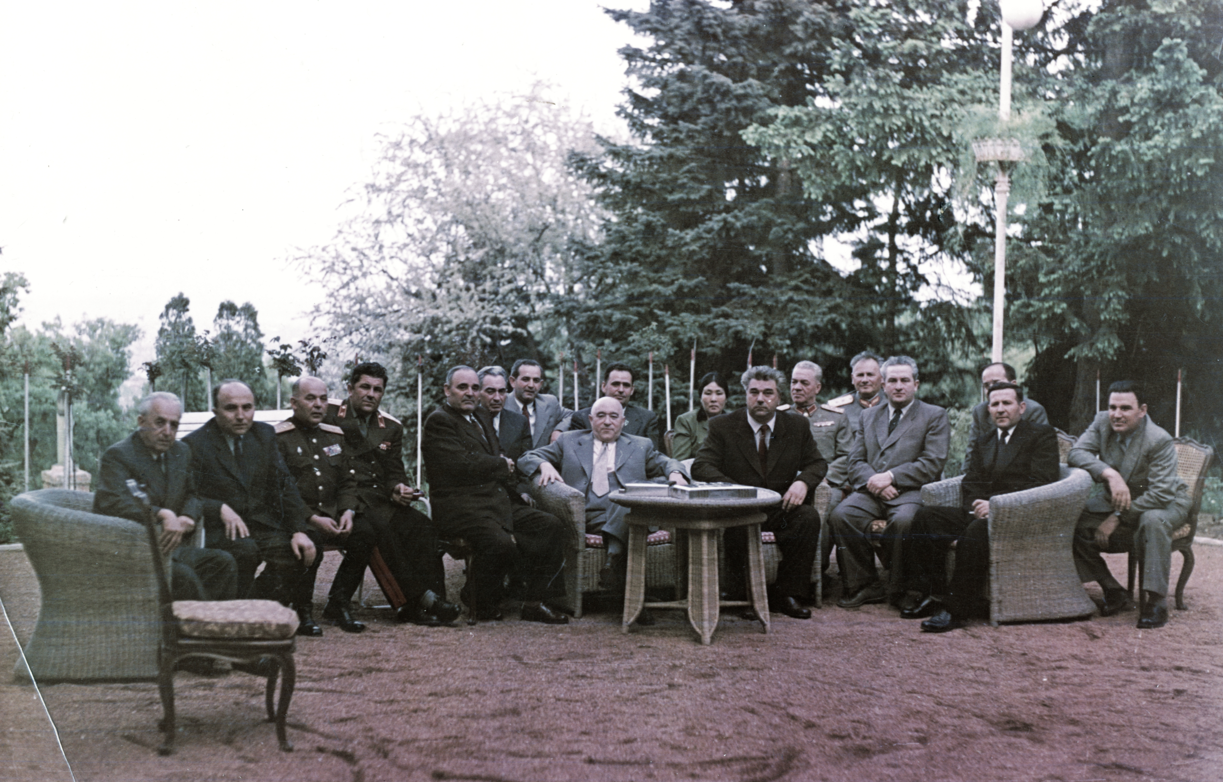 Pártelit. Balról a második Hegedüs András, az ötödik Gheorghe Gheorghiu-Dej, a Román Kommunista Párt főtitkára, a hatodik Gerő Ernő, mellette/mögötte Apró Antal, középen Rákosi Mátyás, mögötte Hidas István, a hölgy Rákosi Mátyás felesége, előtte Vlko Cservenkov, a Bolgár Kommunista Párt főtitkára, miniszterelnök, jobbról a hatodik Emil Bodnăraș, román hadseregtábornok.